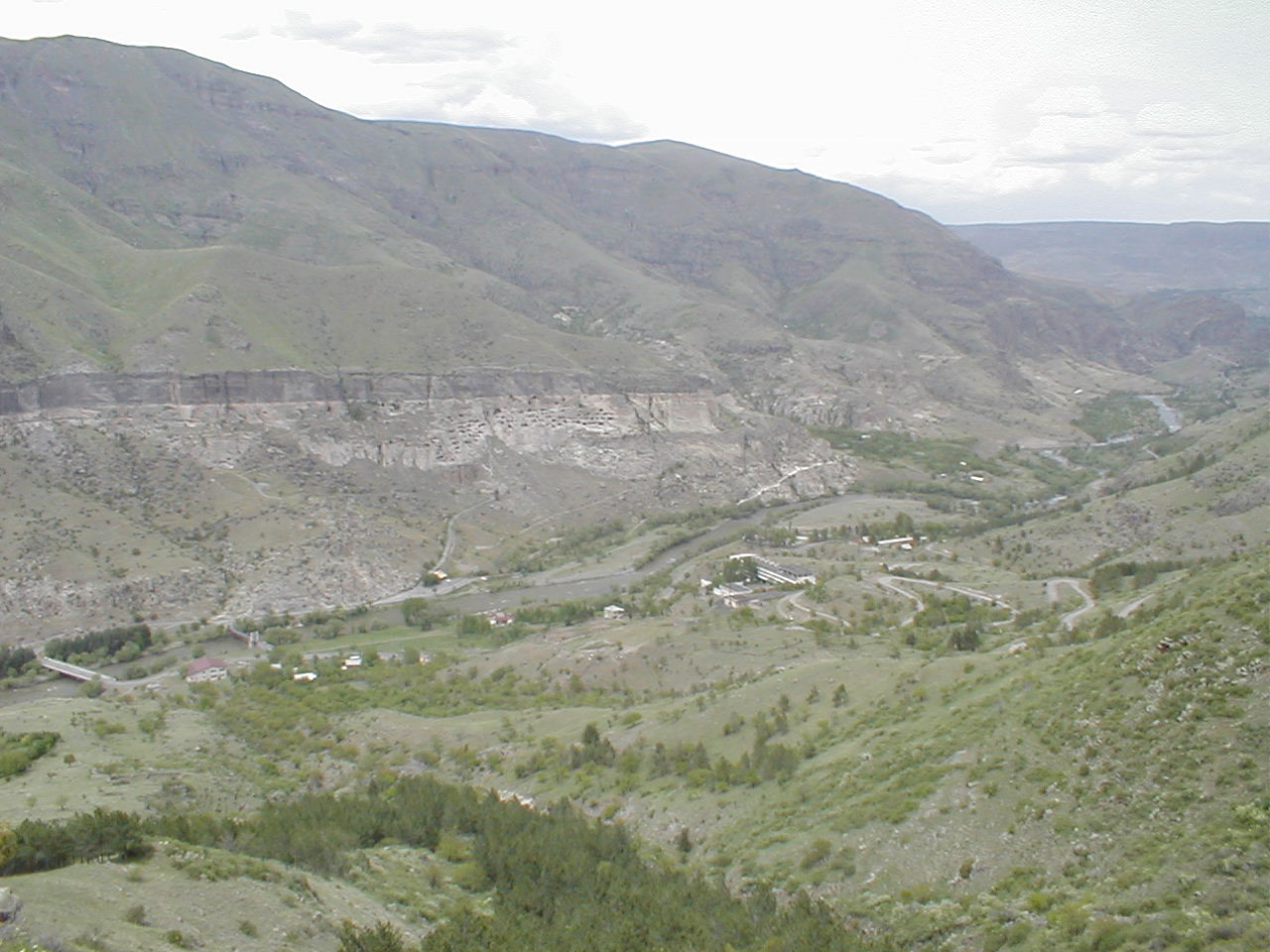 Vardzia